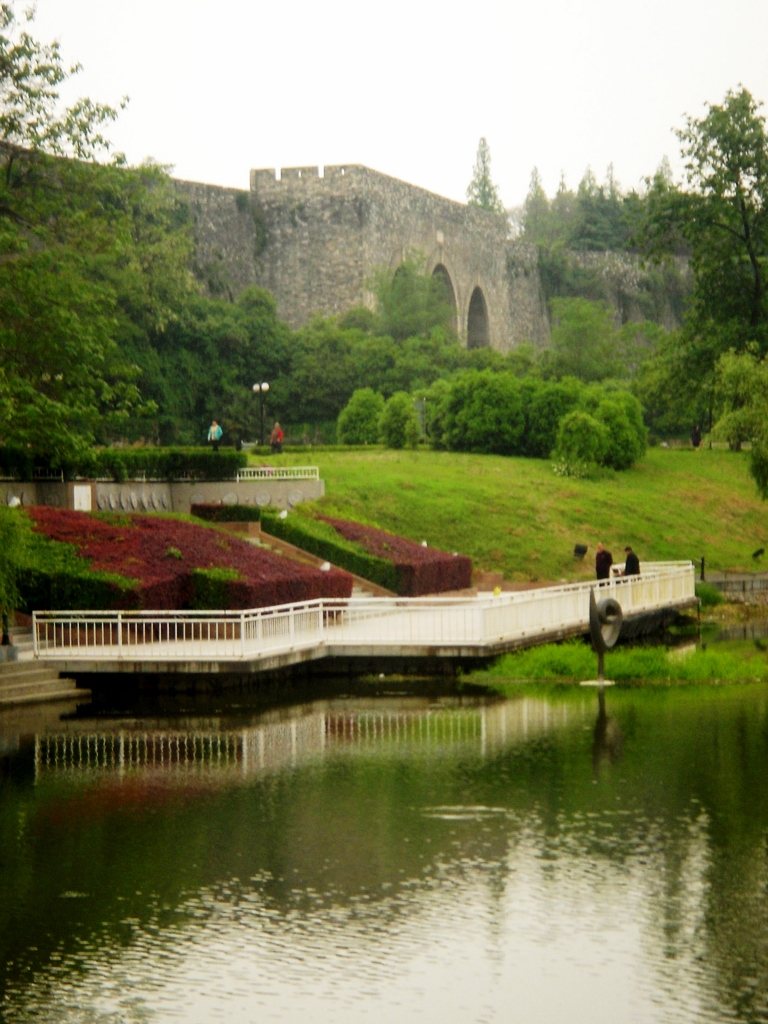 南京中山门与月牙湖公园